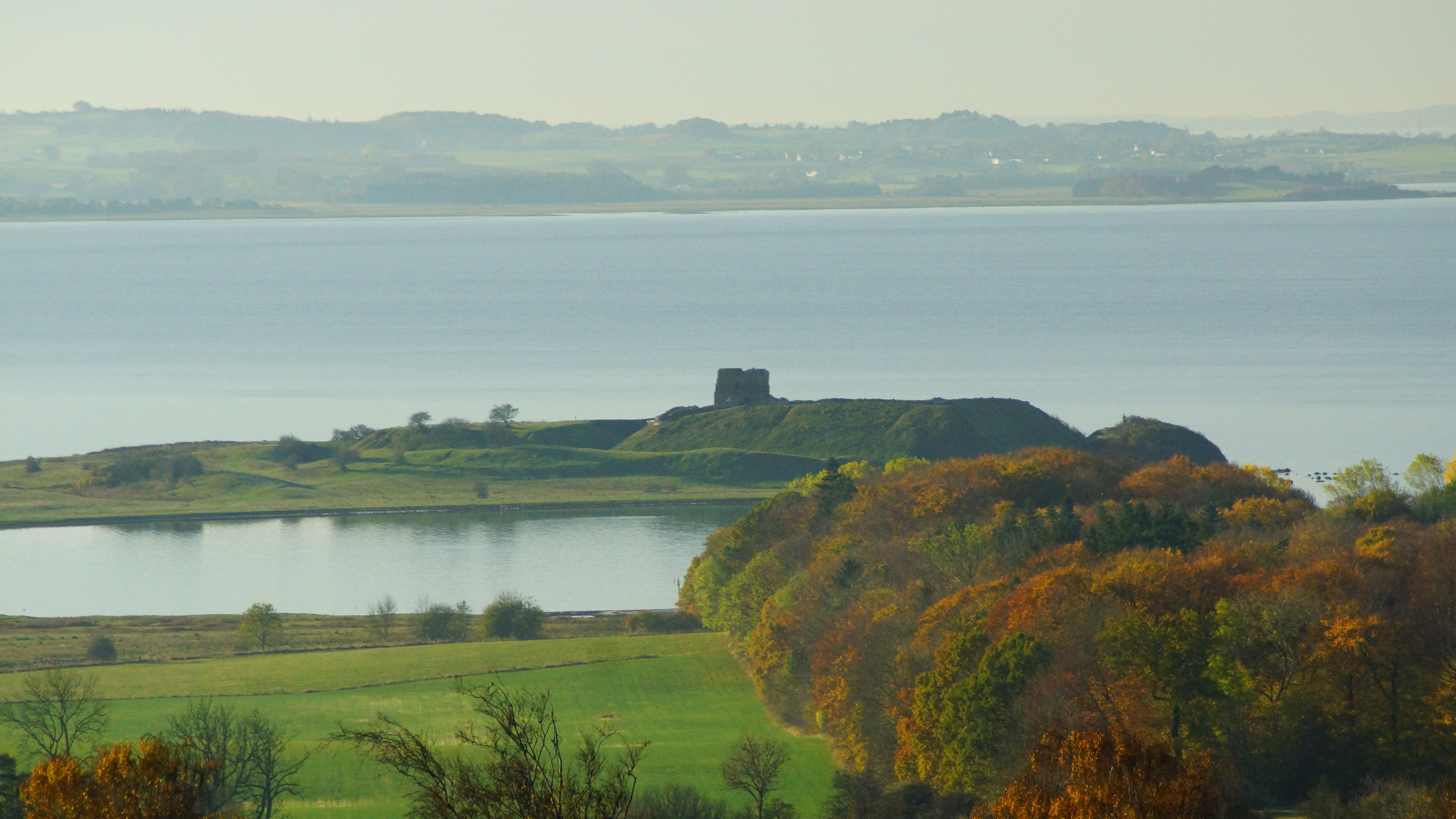 Kalø Slotsruin med Hestehave Skov set fra toppen af Rønde